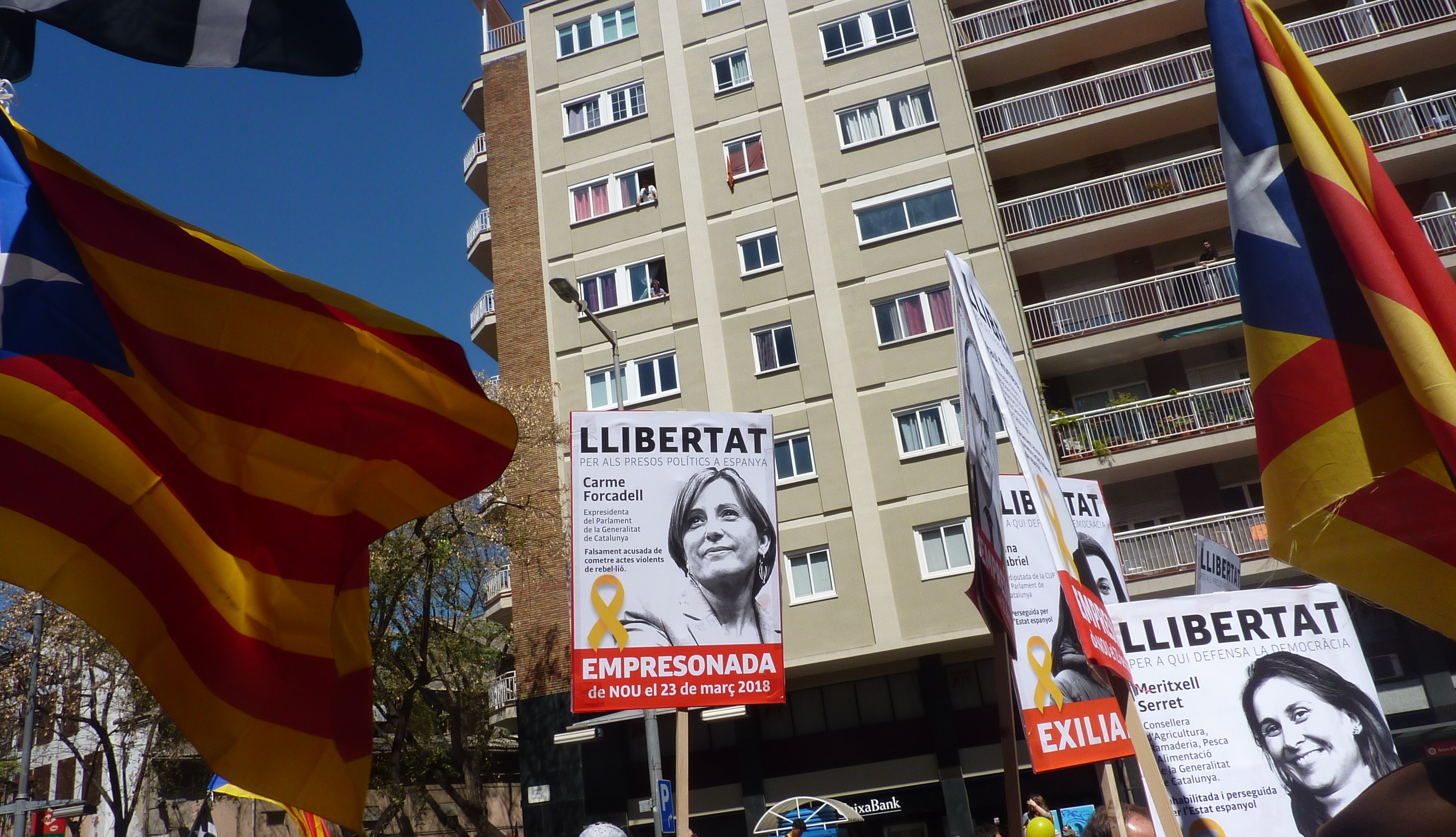 Manifestation à Barcelone contre l'incarcération (préventive) des dirigeants catalans qualifiés par les manifestants de prisonniers politiques.